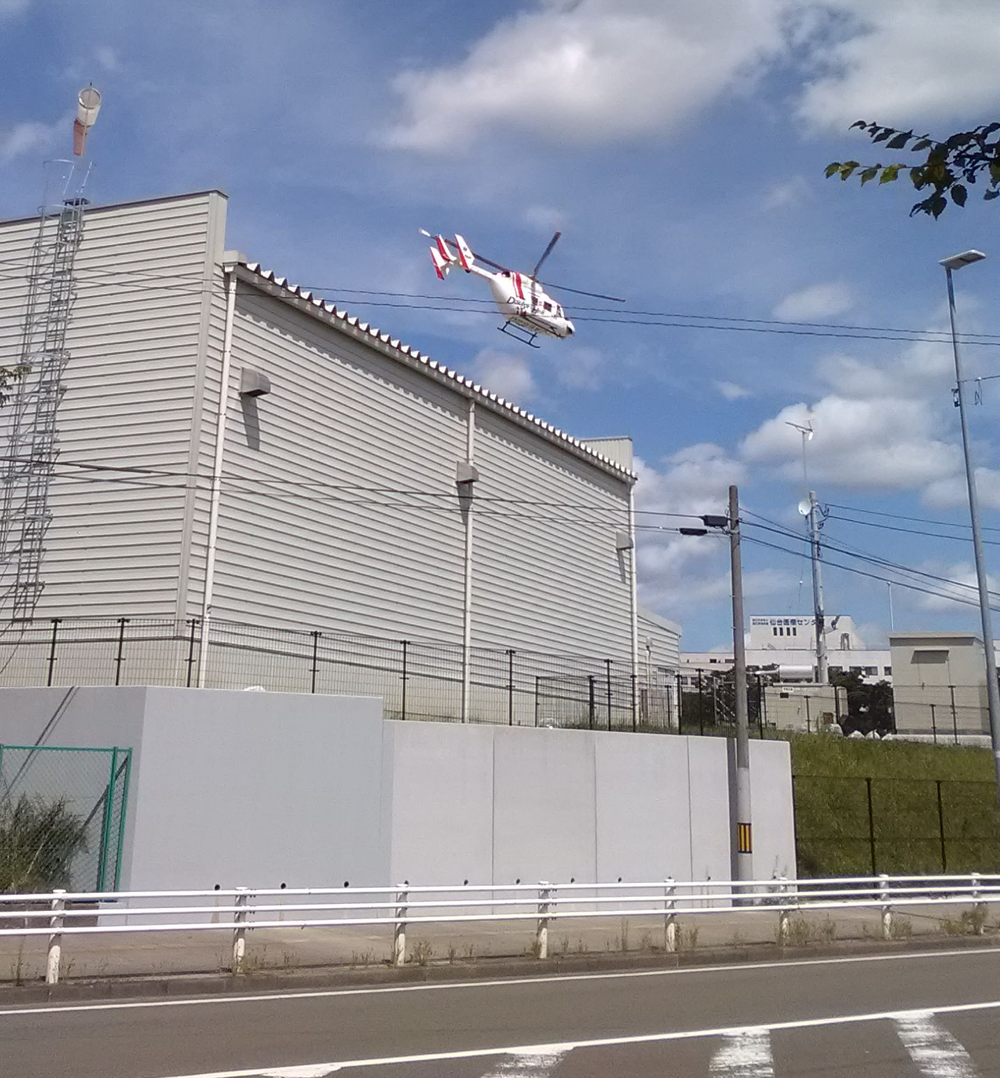 宮城野原公園総合運動場のランデブーポイントから離陸するドクターヘリ。救急車の到着から離陸まで3分ほどだった。